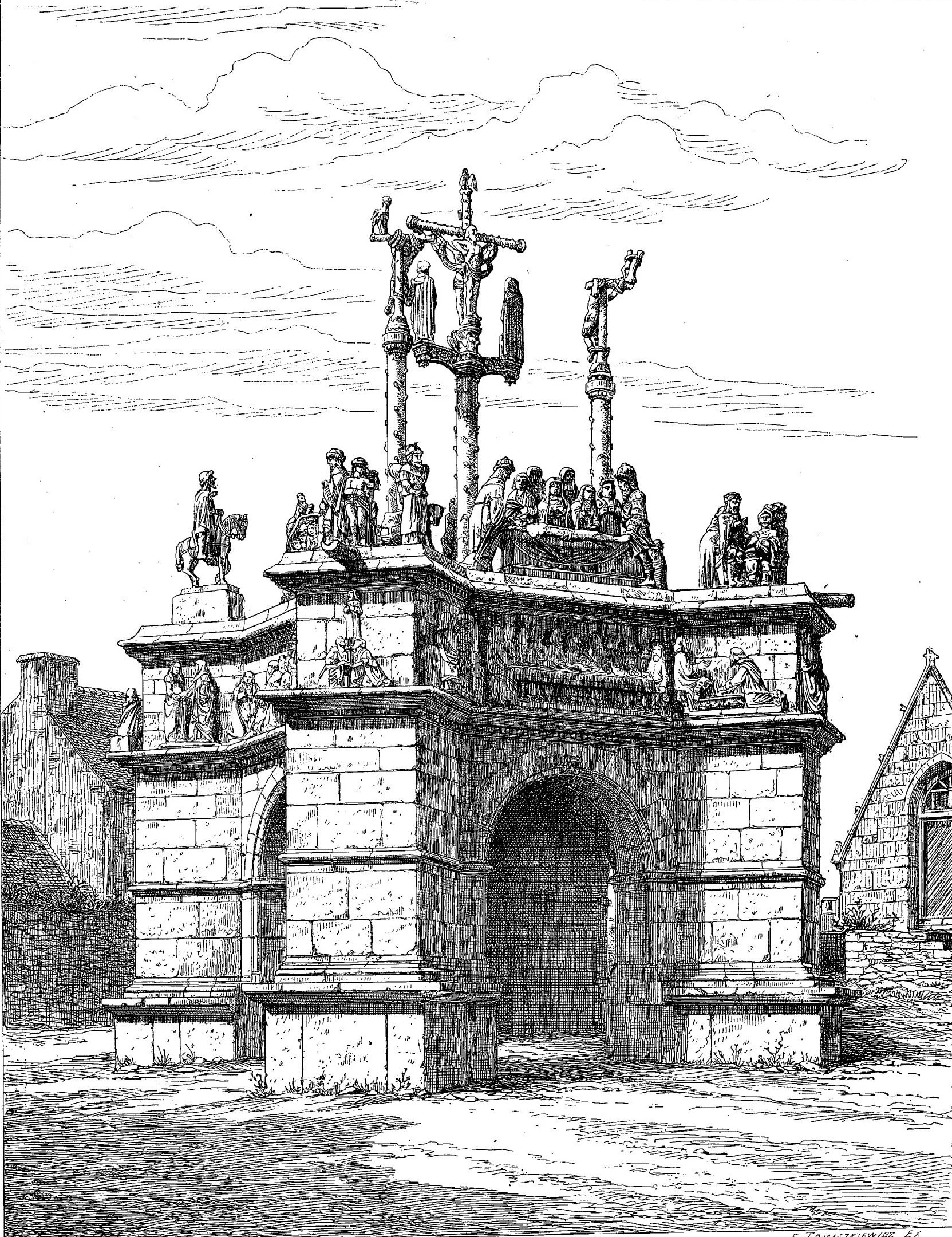 Dessin représentant le calvaire de Pleyben en 1880 (Revue "l'Art pour tous")